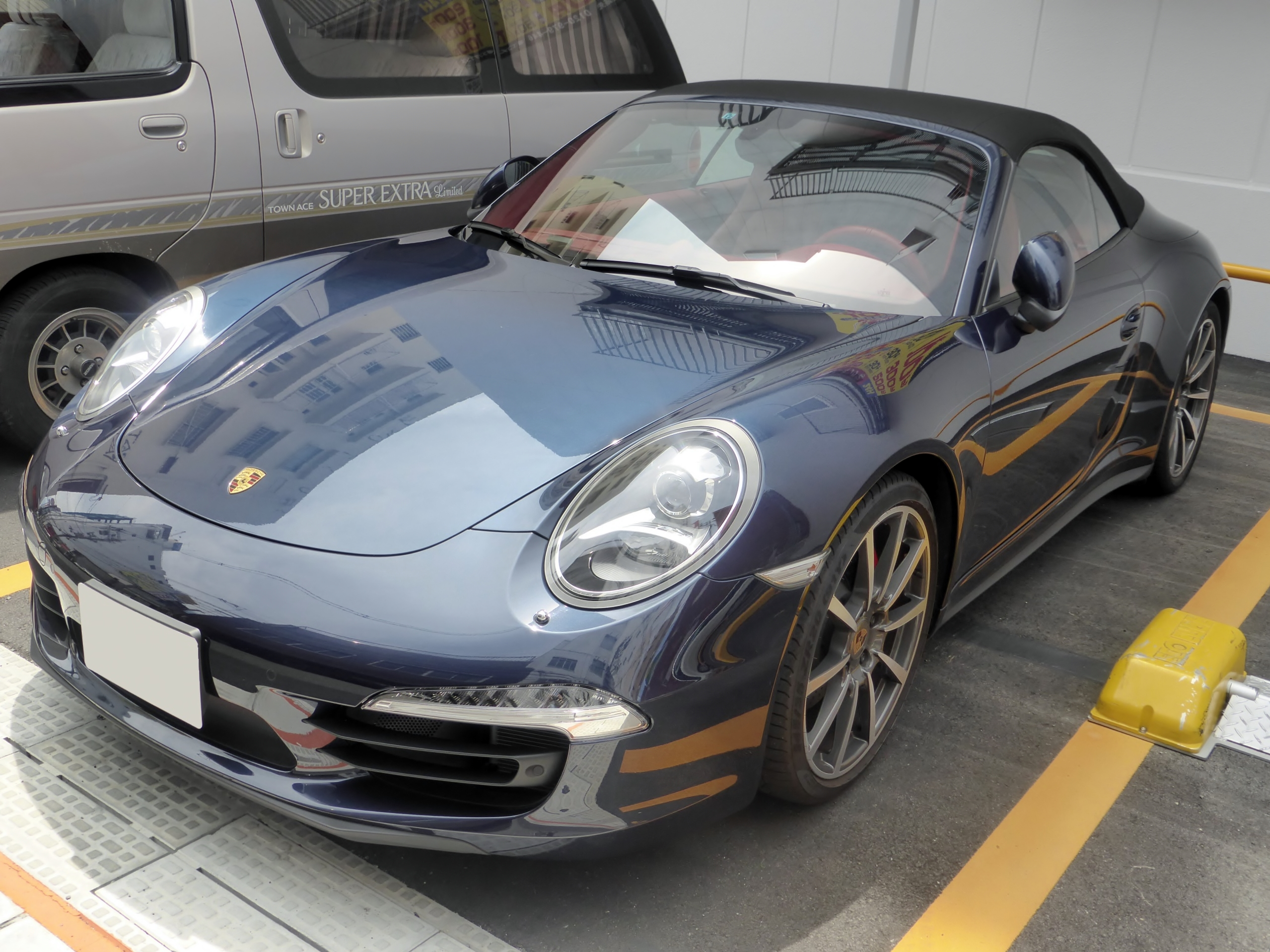 ポルシェ・991カレラ4Sカブリオレをフロントから撮影。